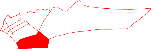 Ubicación de la parroquia Punta Gorda en el municipio Cabimas, estado Zulia, Venezuela